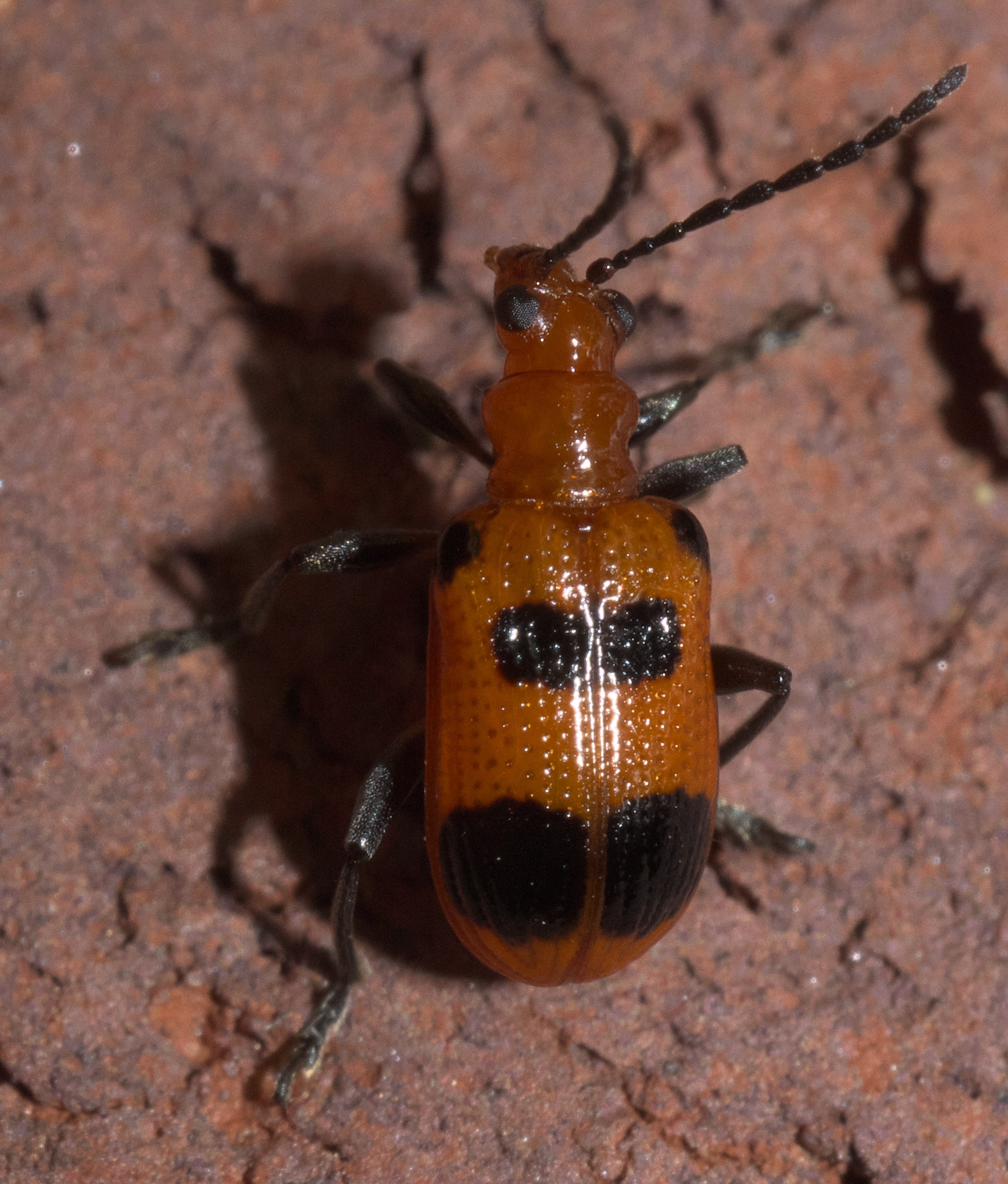 Neolema sexpunctata, Six-spotted Neolema, Size: 5.7 mm, ID Confidence: 90